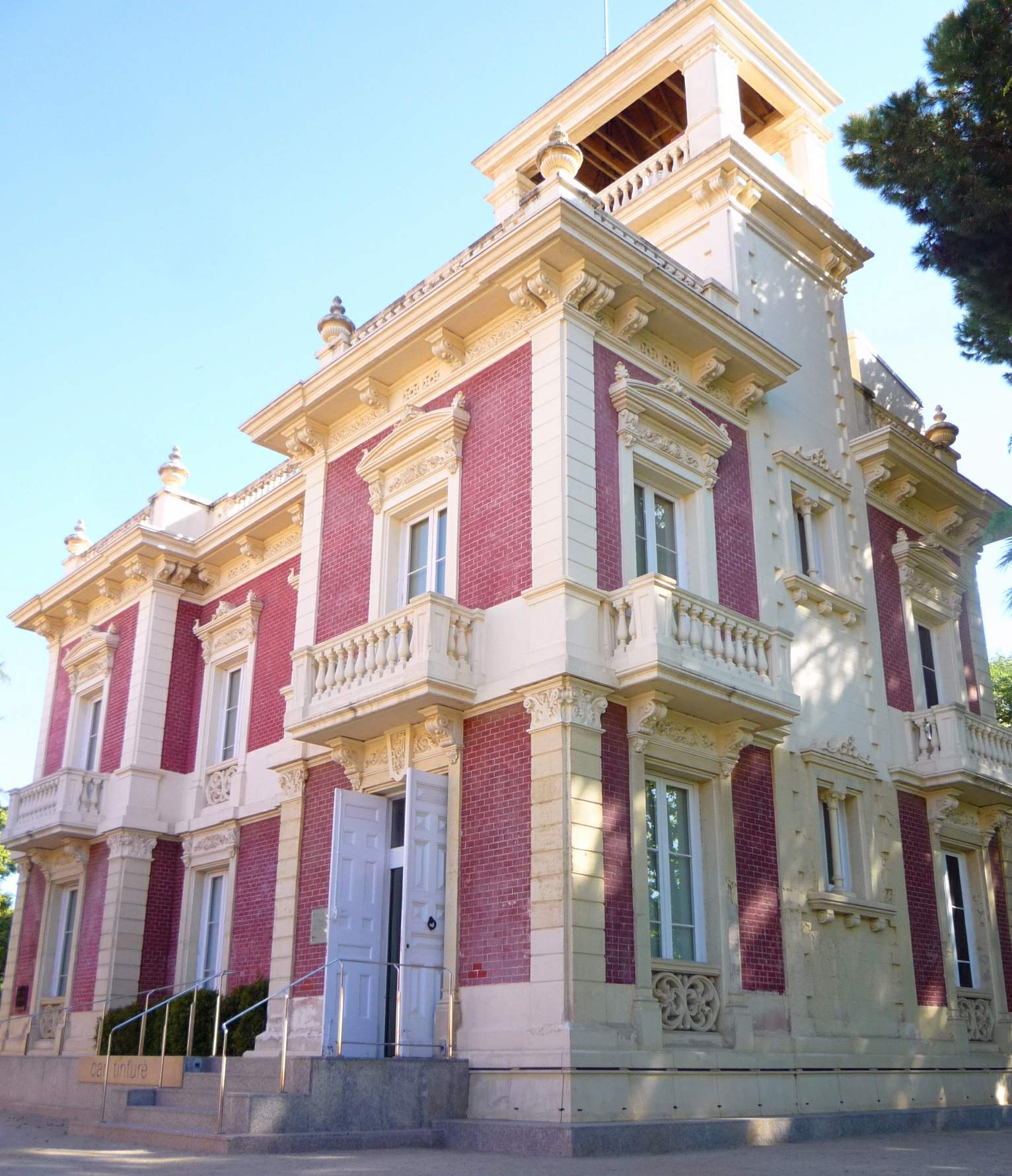 Esplugues de Llobregat - Museu Can Tinturé